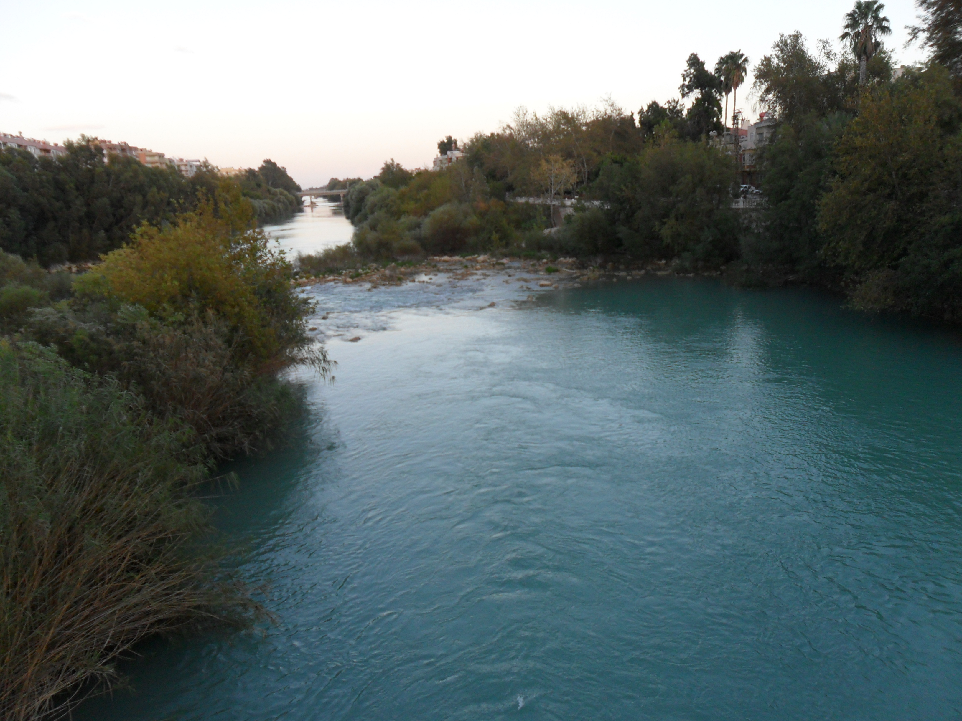 Silifke'deki tarihî Taşköprü üzerinden çekilen bir fotoğraf. Köprünün altından Göksu geçiyor.